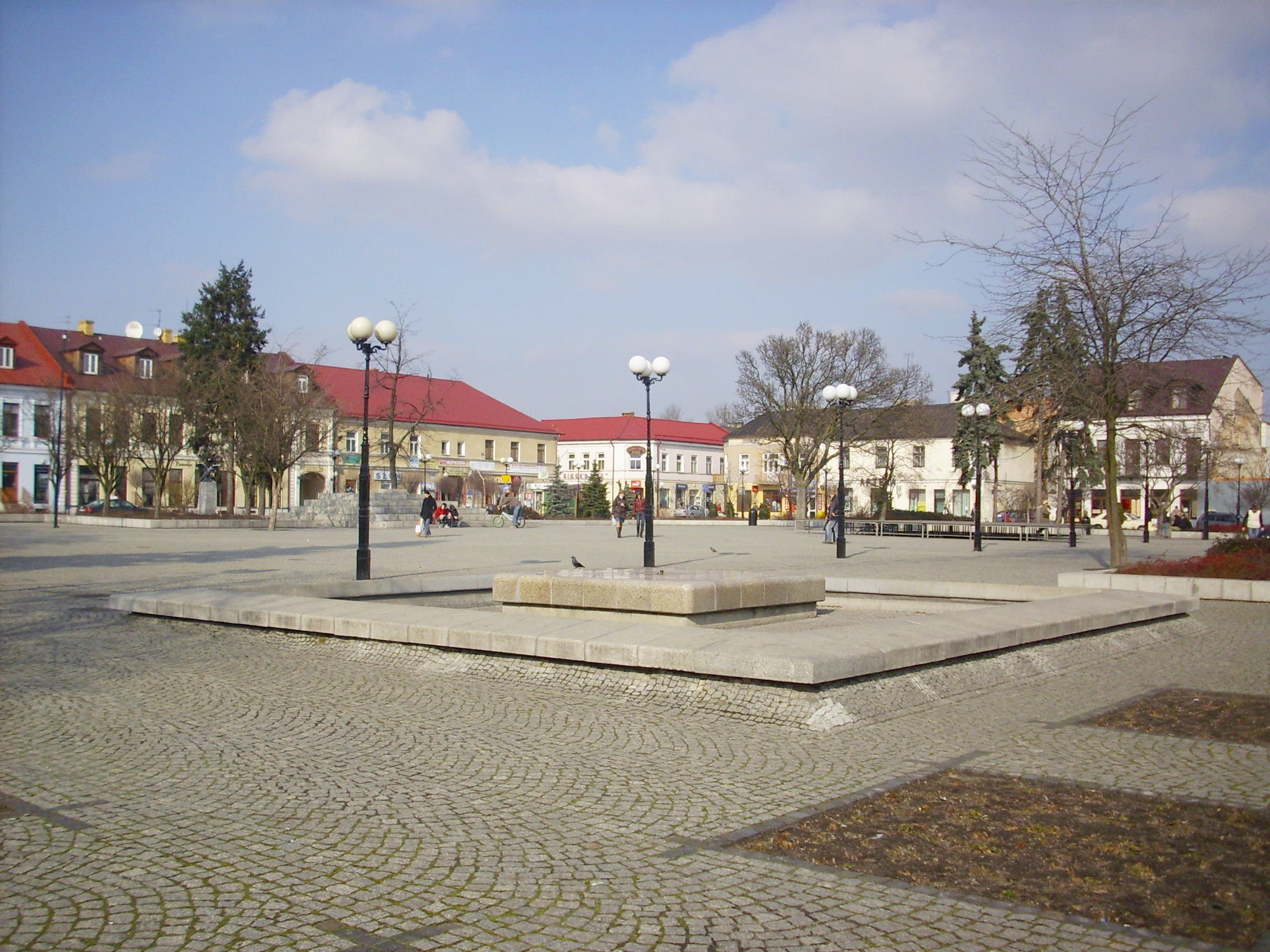 Biała Podlaska, pl. Wolności (Rynek).